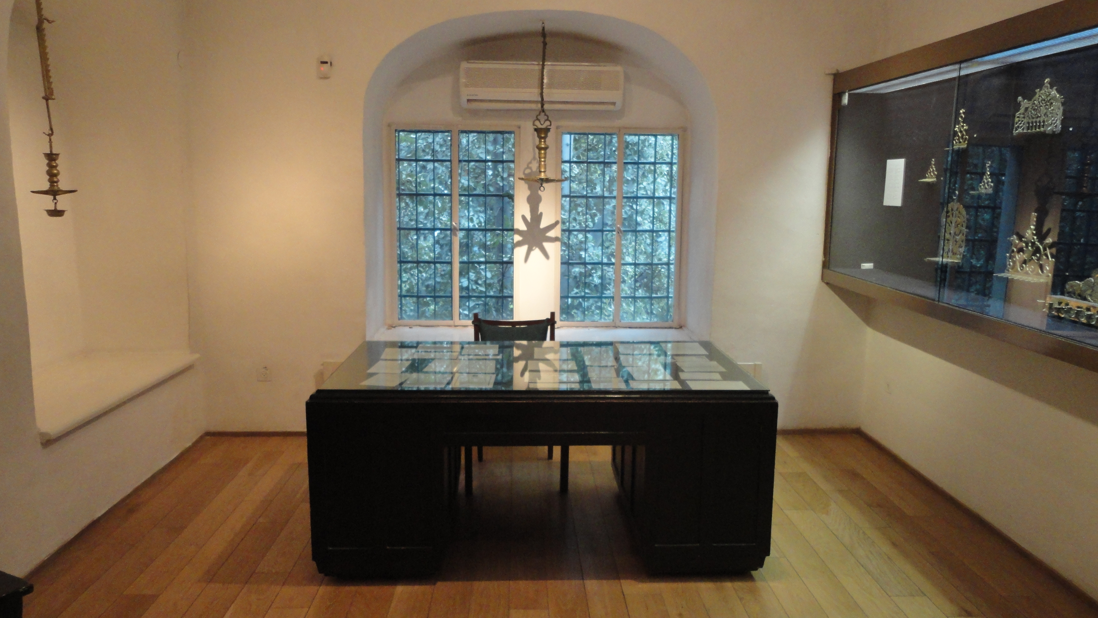 בית טיכו הוא אחד הבתים הראשונים בירושלים שנבנו מחוץ לחומות העיר העתיקה. הבית שימש למגוריהם ועבודתם של האומנית אנה טיכו ובעלה הרופא החוקר אברהם אלברט טיכו. כיום המקום משמש כמוזיאון המנציח את פועלם.